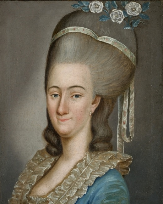 Anna z Ossolińskich Krasińska